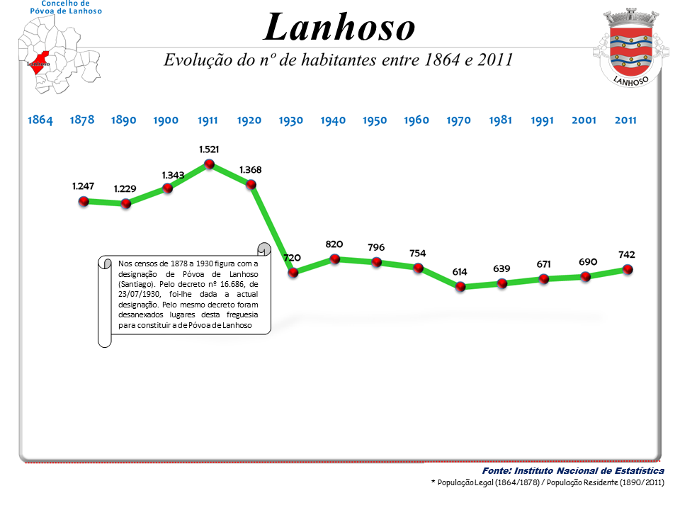 Censos 1864/2011